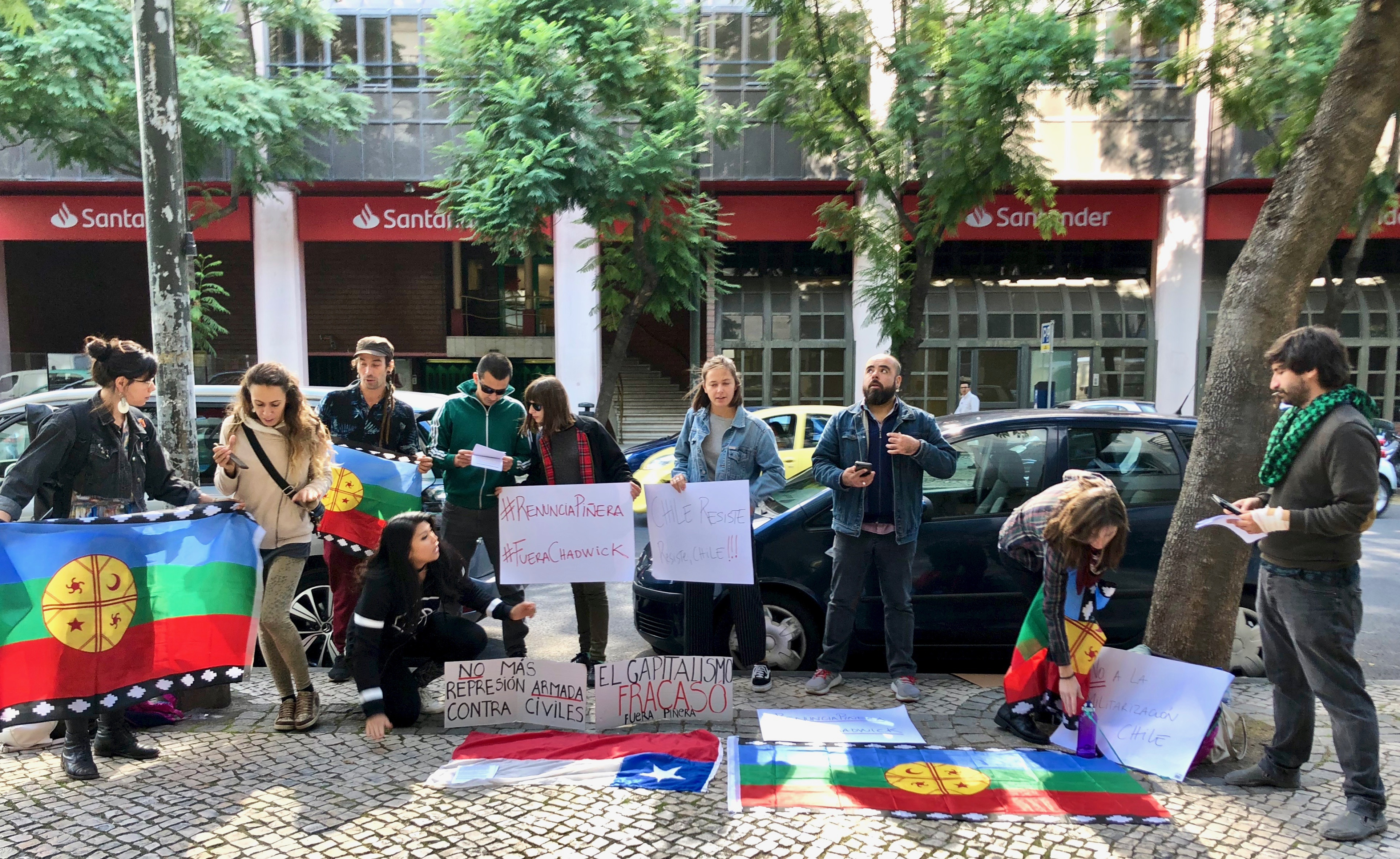 Chile Consulate at Lisbon, R. João Crisóstemo, Lisbon, Portugal